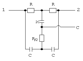 Categoria:Immagini esclusivamente in GNU FDL